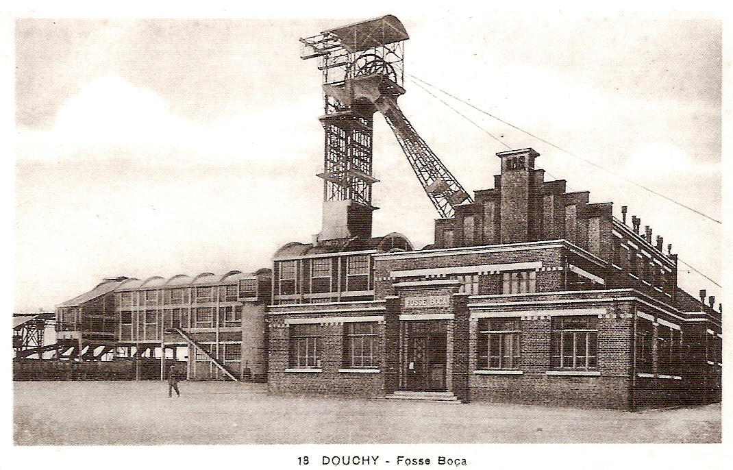 Ancienne fosse Boca des mines de Douchy aujourd'hui disparue.